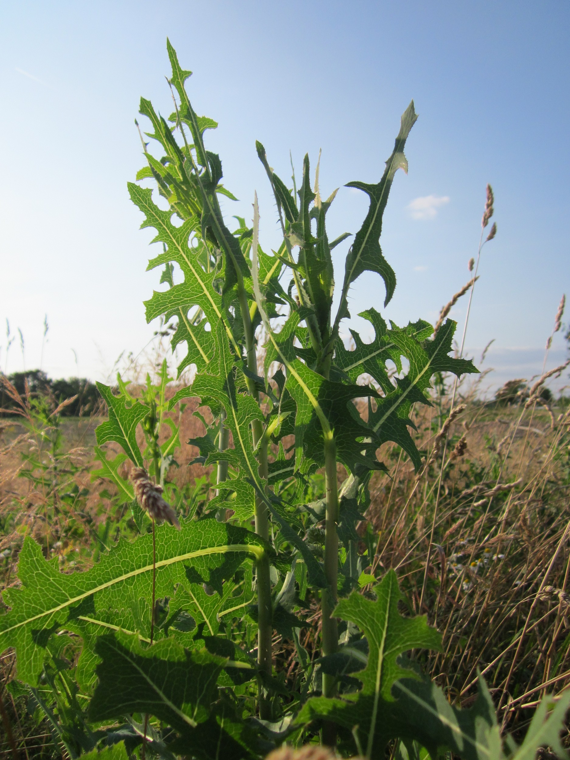 Stachel-Lattich (Lactuca serriola) im Hockenheimer Rheinbogen